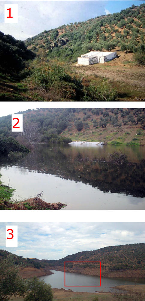 proceso año a año lugar sumergido....